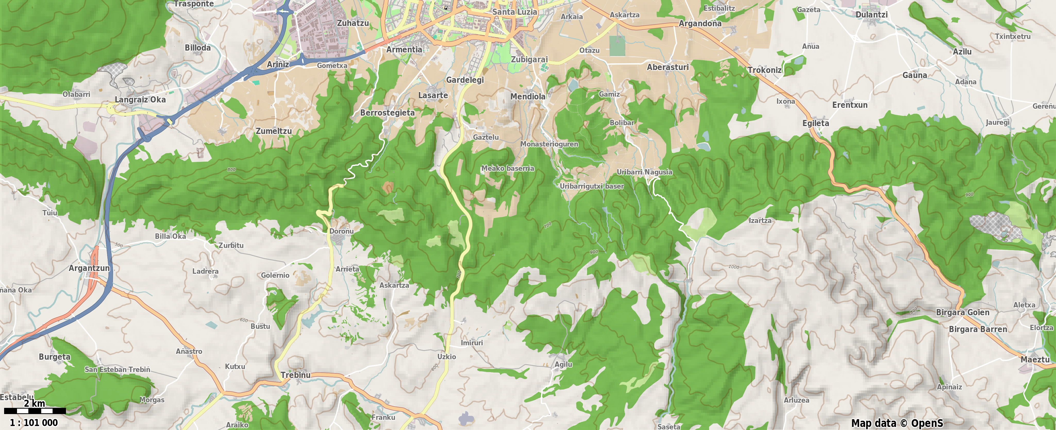 Gasteizko mendien mapa